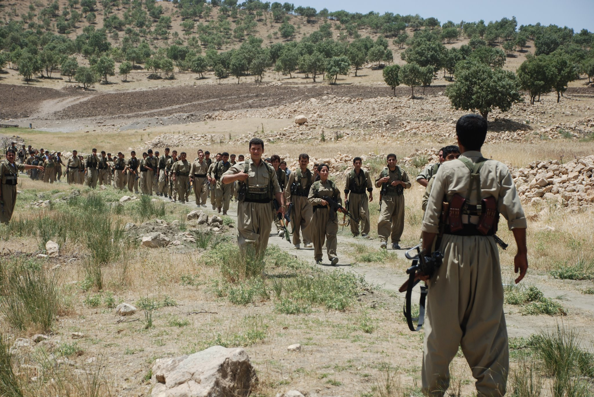 YPG